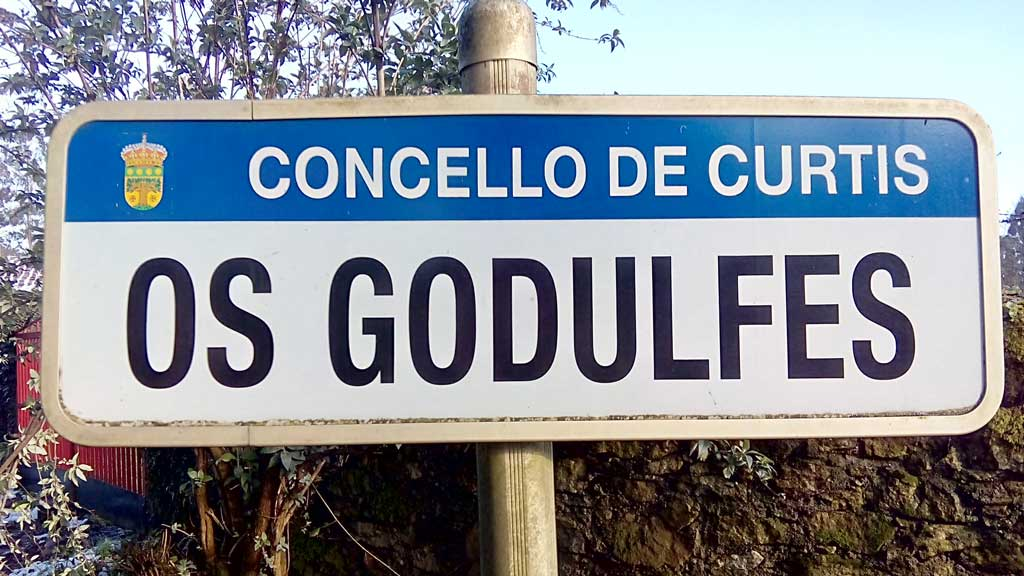 Os Godulfes, Fisteus.